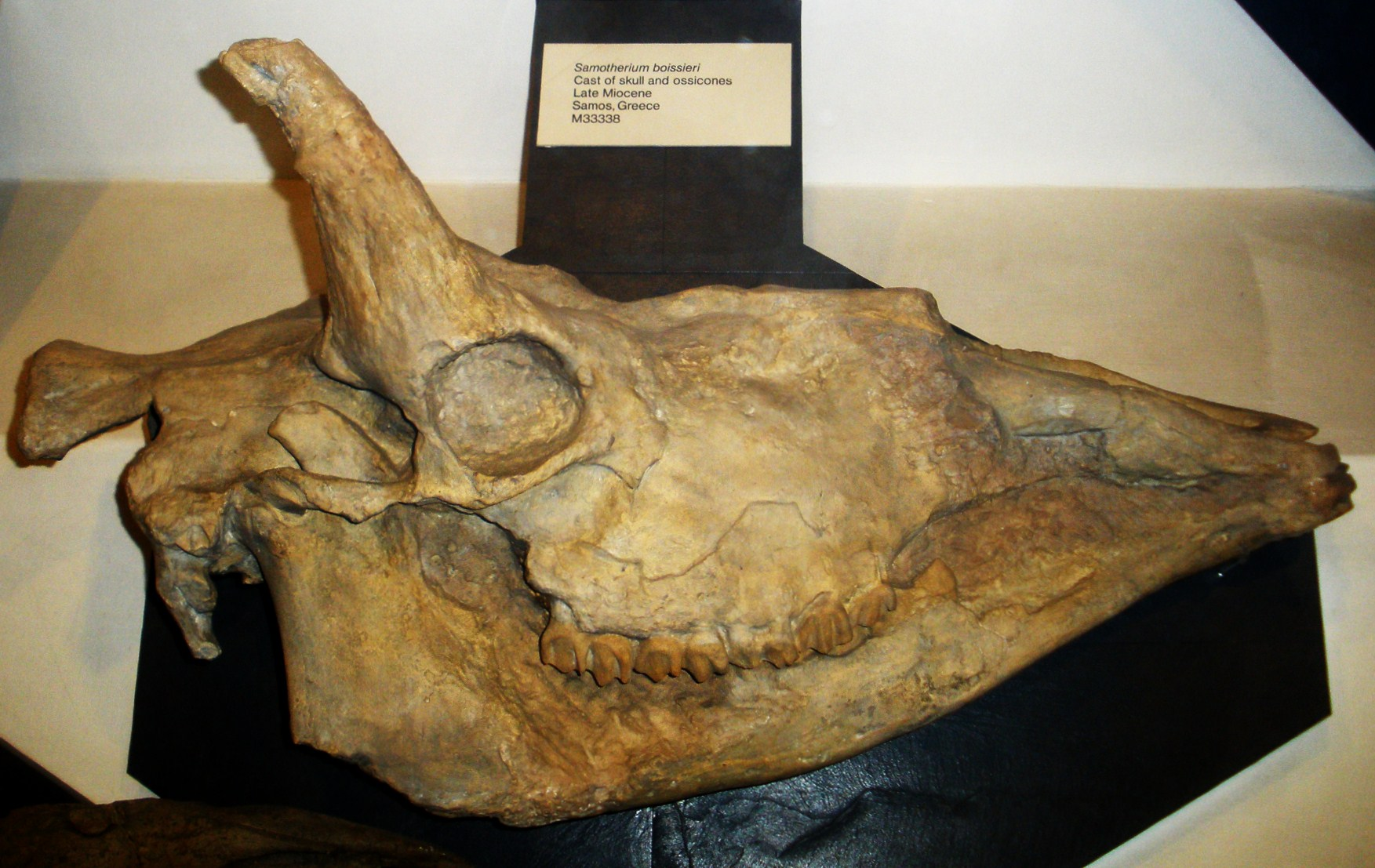 Fossil of Samotherium, an extinct mammal -- Took the photo at Natural History Museum, London